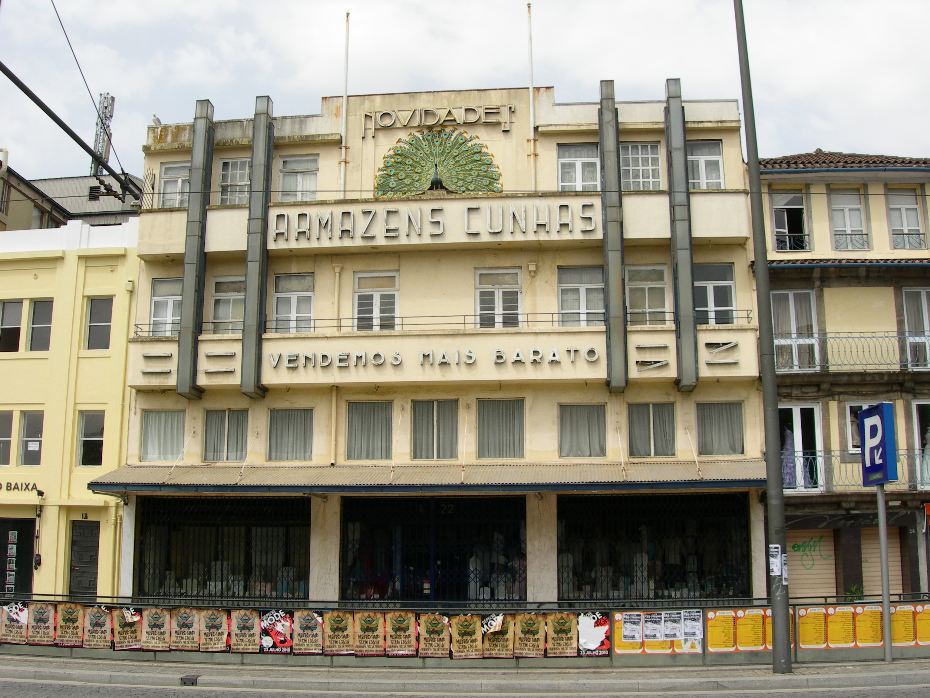 Armazéns Cunha, no Largo Gomes Teixeira nº 14 - 22 This file was uploaded for Wiki Loves Monuments in Portugal with the unique identifier 97005478.